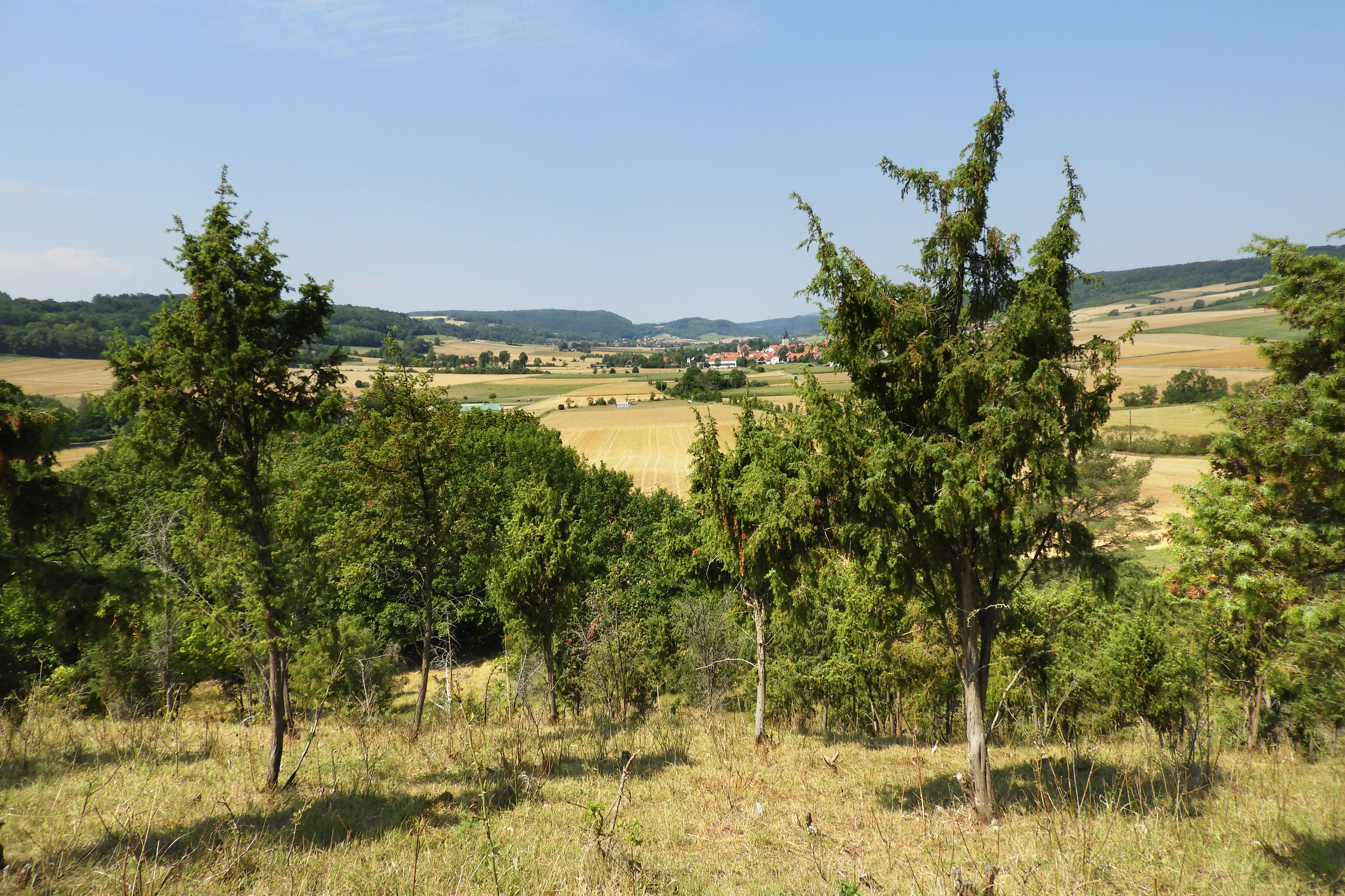 Der „Wald südöstlich von Netra“ liegt im nördlichen Hessen, in der Nähe der Landesgrenze zu Thüringen. Administrativ gehören die Flächen zu den Gemarkungen der Ortsteile Netra, Rittmannshausen und Lüderbach der Gemeinde Ringgau im nordhessischen Werra-Meißner-Kreis. Der sich in einer Talung des Muschelkalk-Plateaus des Ringgaus befindende Bereich wird durch ein Mosaik verschiedener Waldgesellschaften und von Kalk-Halbtrockenrasen geprägt. Wegen dem Vorkommen von Lebensräumen sowie Tier- und Pflanzenarten, die nach der im Jahr 1992 von den Mitgliedstaaten der Europäischen Union beschlossenen Flora-Fauna-Habitat-Richtlinie als von gemeinschaftlicher Bedeutung gelten, wurde der Bereich zu einem Bestandteil des europaweiten Schutzgebietssystems Natura 2000.